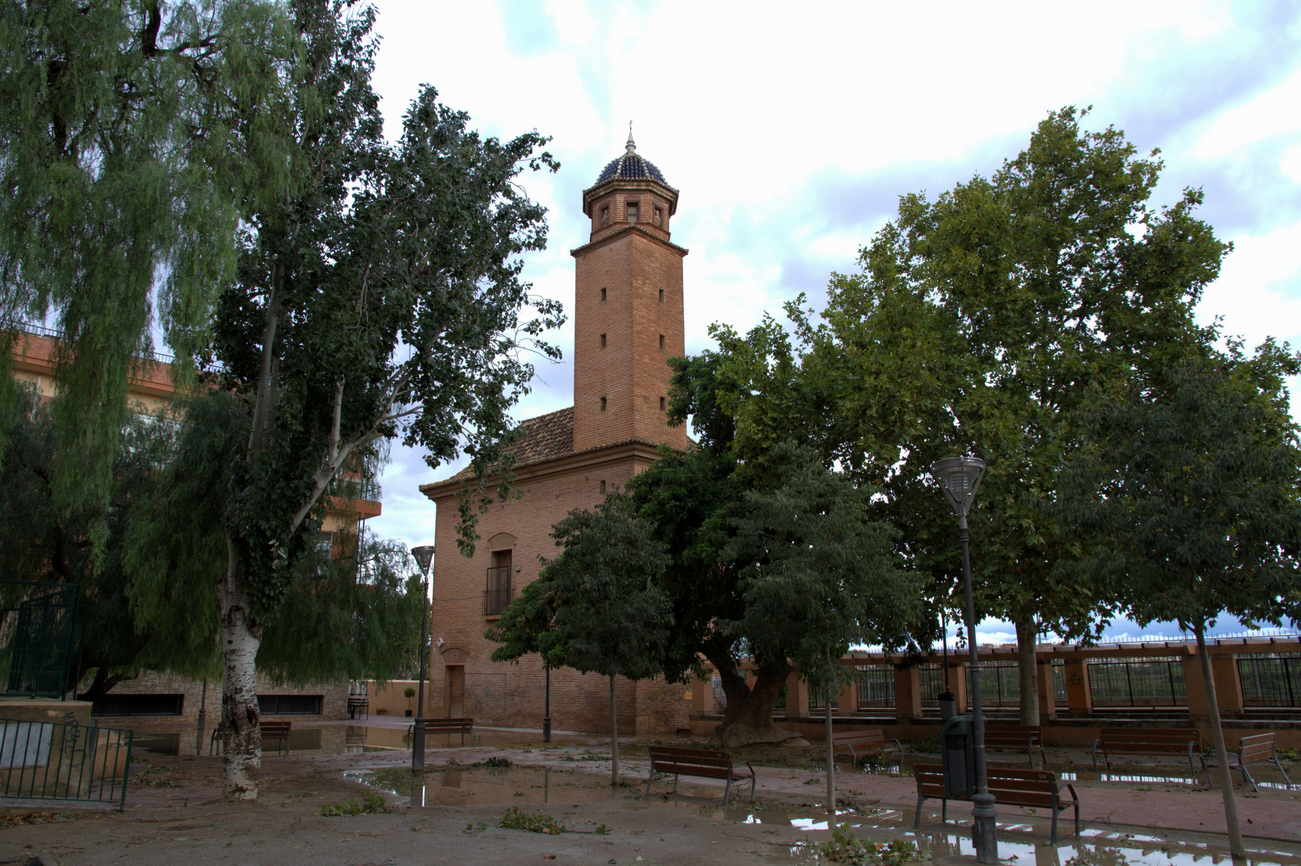 Torre de la Casa Palau dels Boïl o Cerdanyola